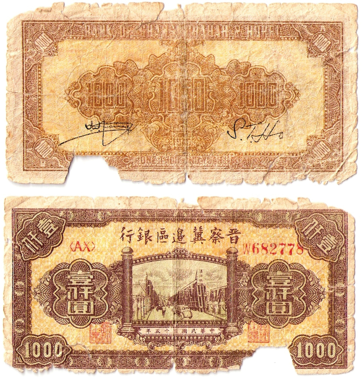 晋察冀边区银行1000圆钞票，发行于1946年，版权已过期。